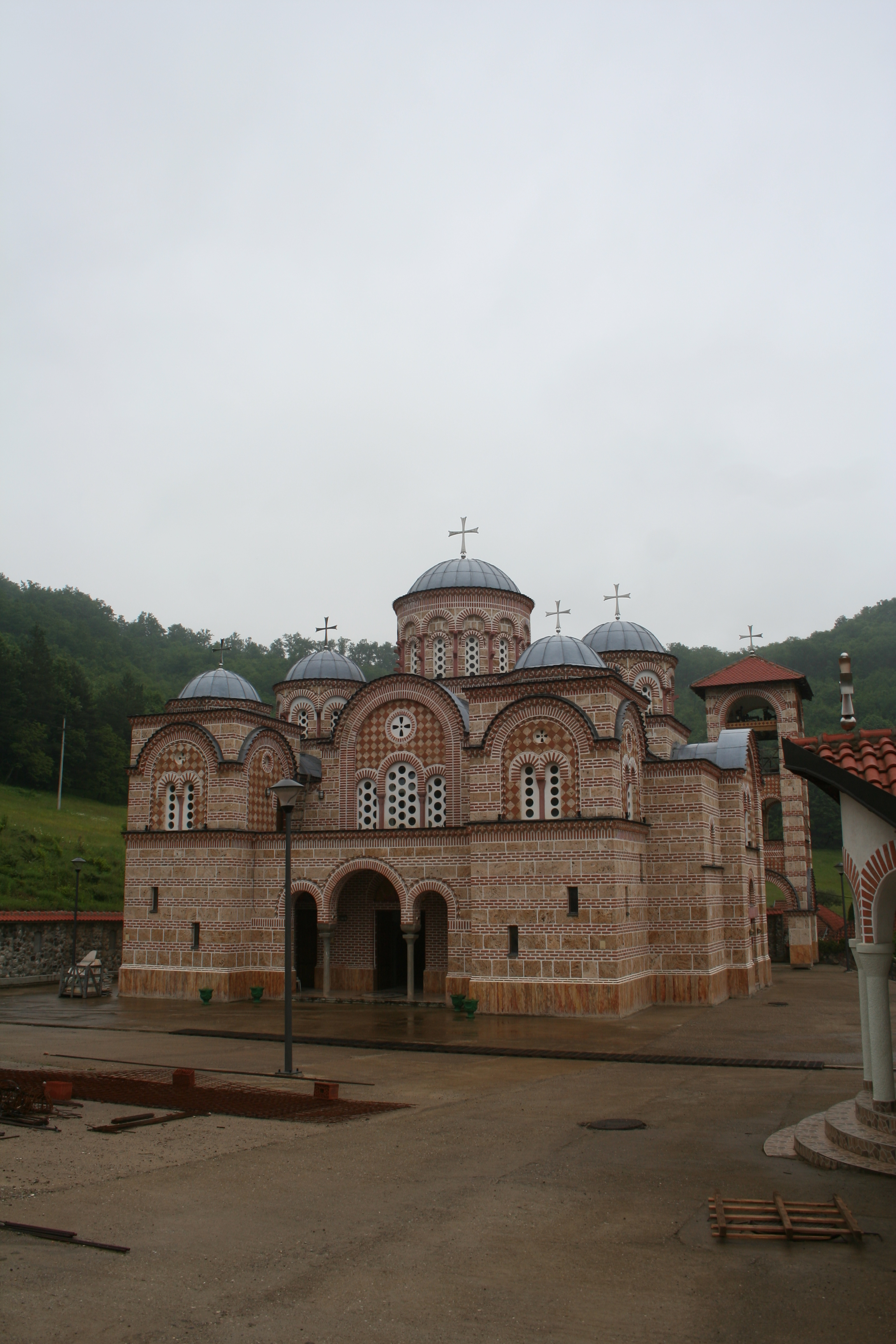 Manastir Ćelije